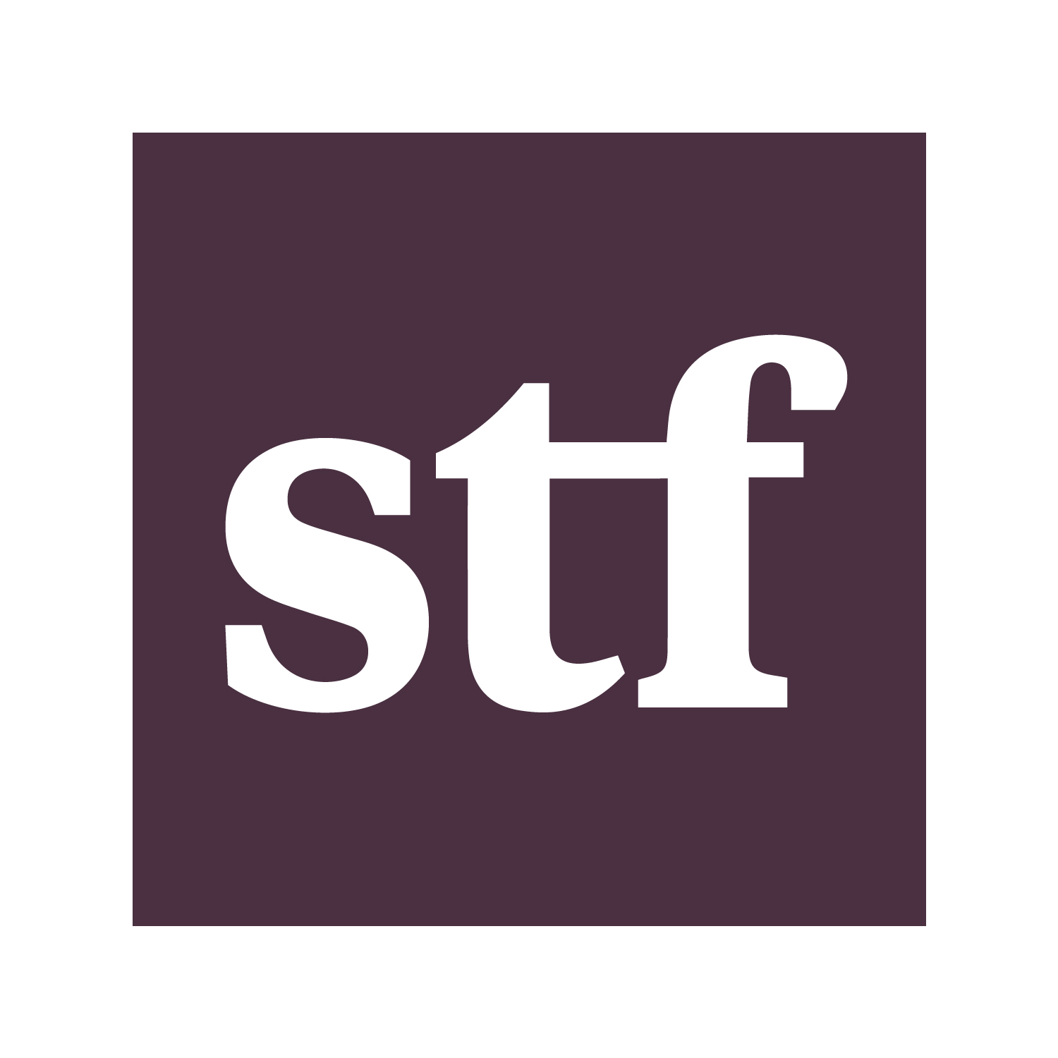 Logo STF